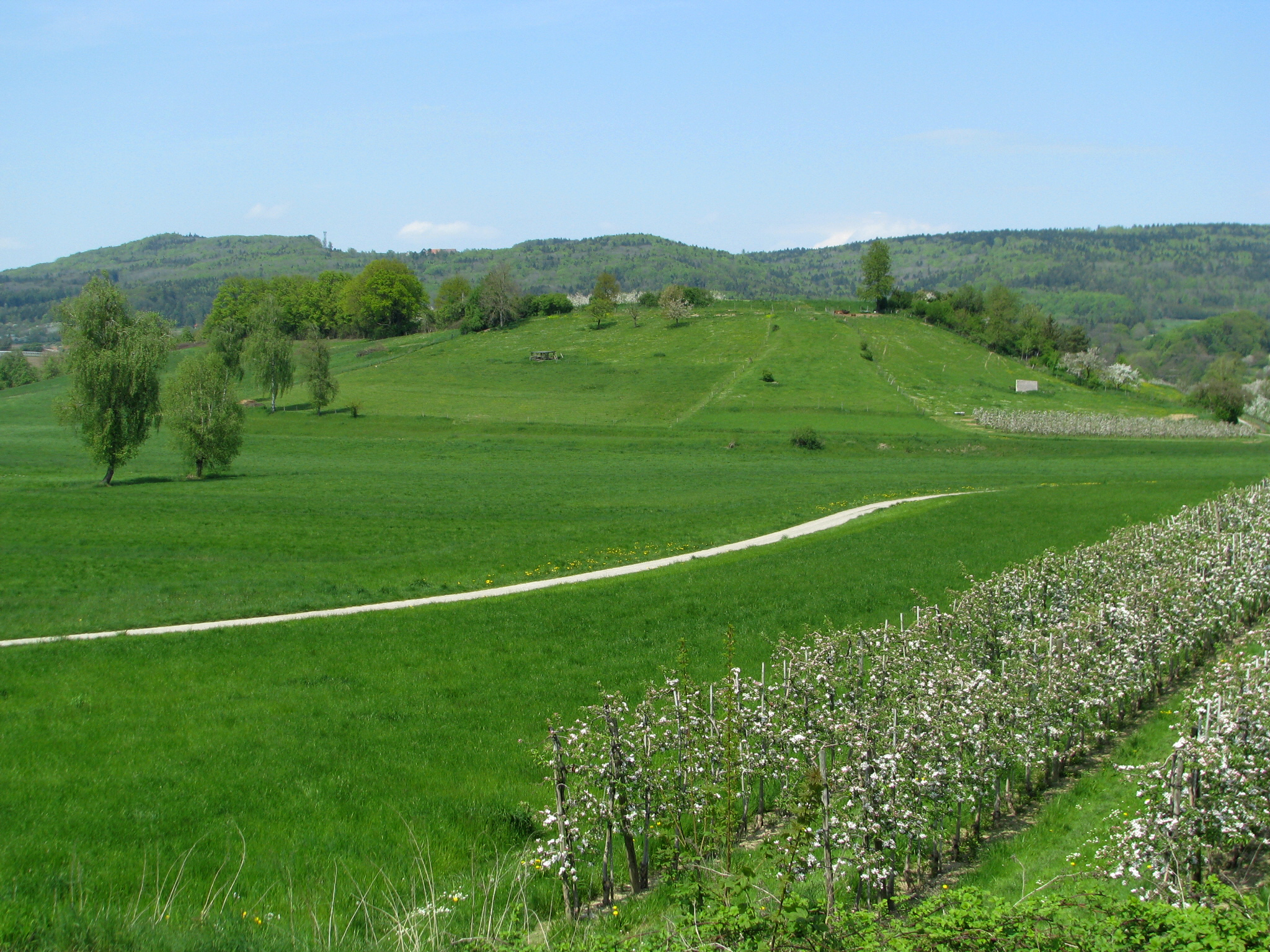 Drumlin bei Markdorf im Bodenseekreis, im Hintergrund der Gehrenberg